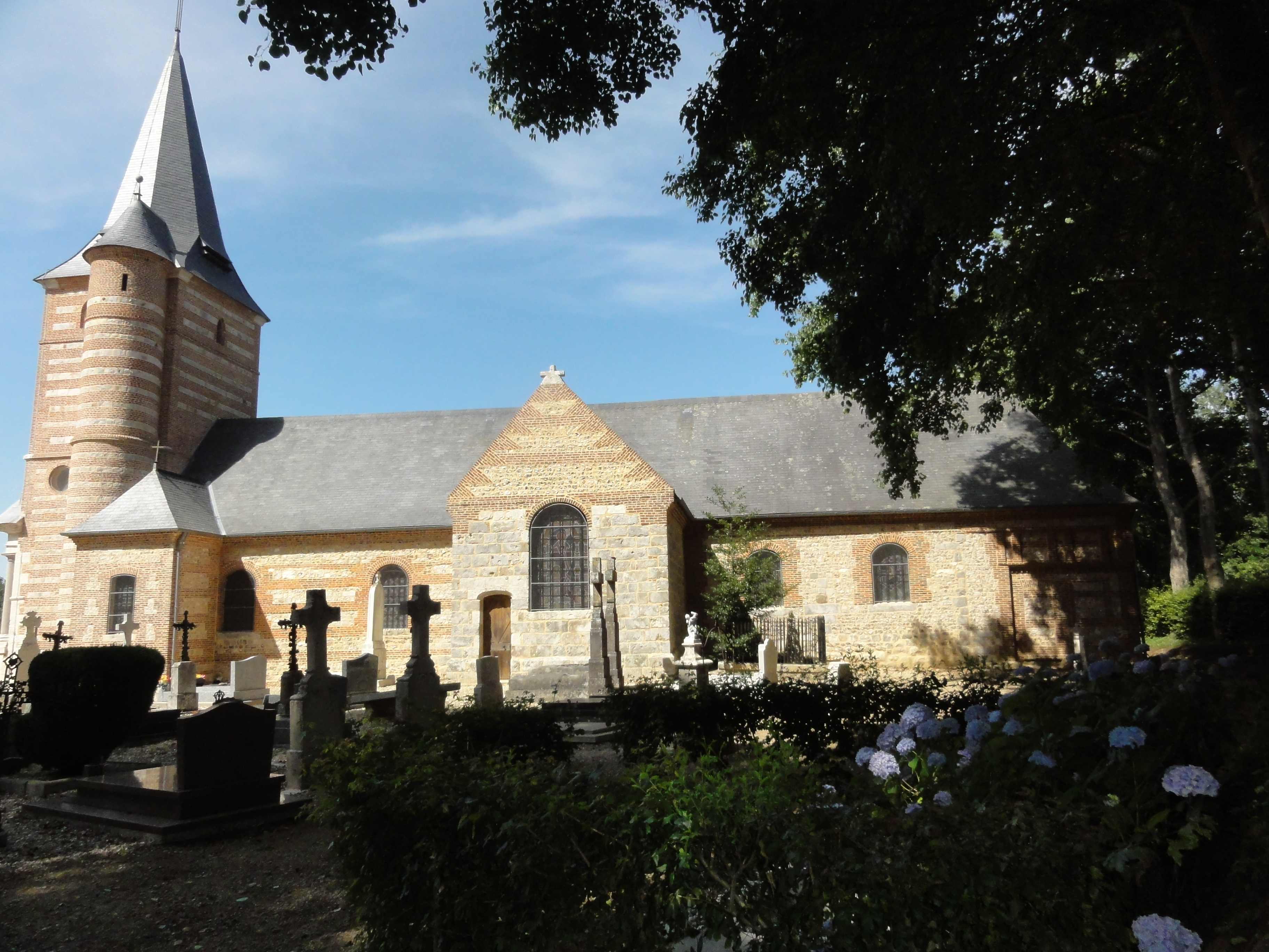 Veauville-lès-Quelles (Seine-Mar.) église